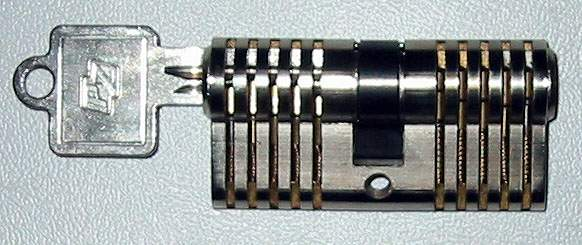 Schnitt durch ein Stiftschloss